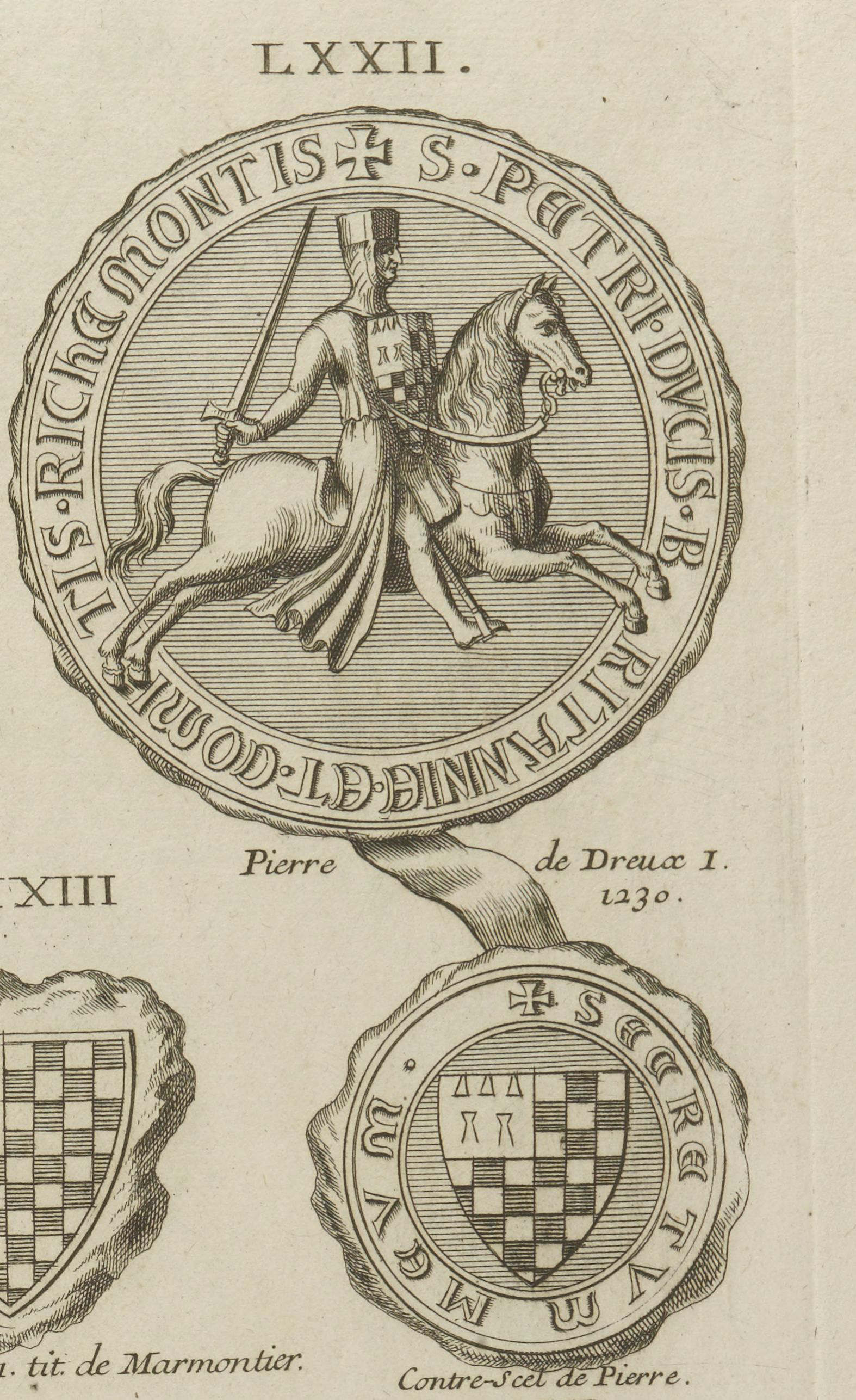 Sceau et contre-sceau de Pierre de Dreux, duc de Bretagne jure uxoris